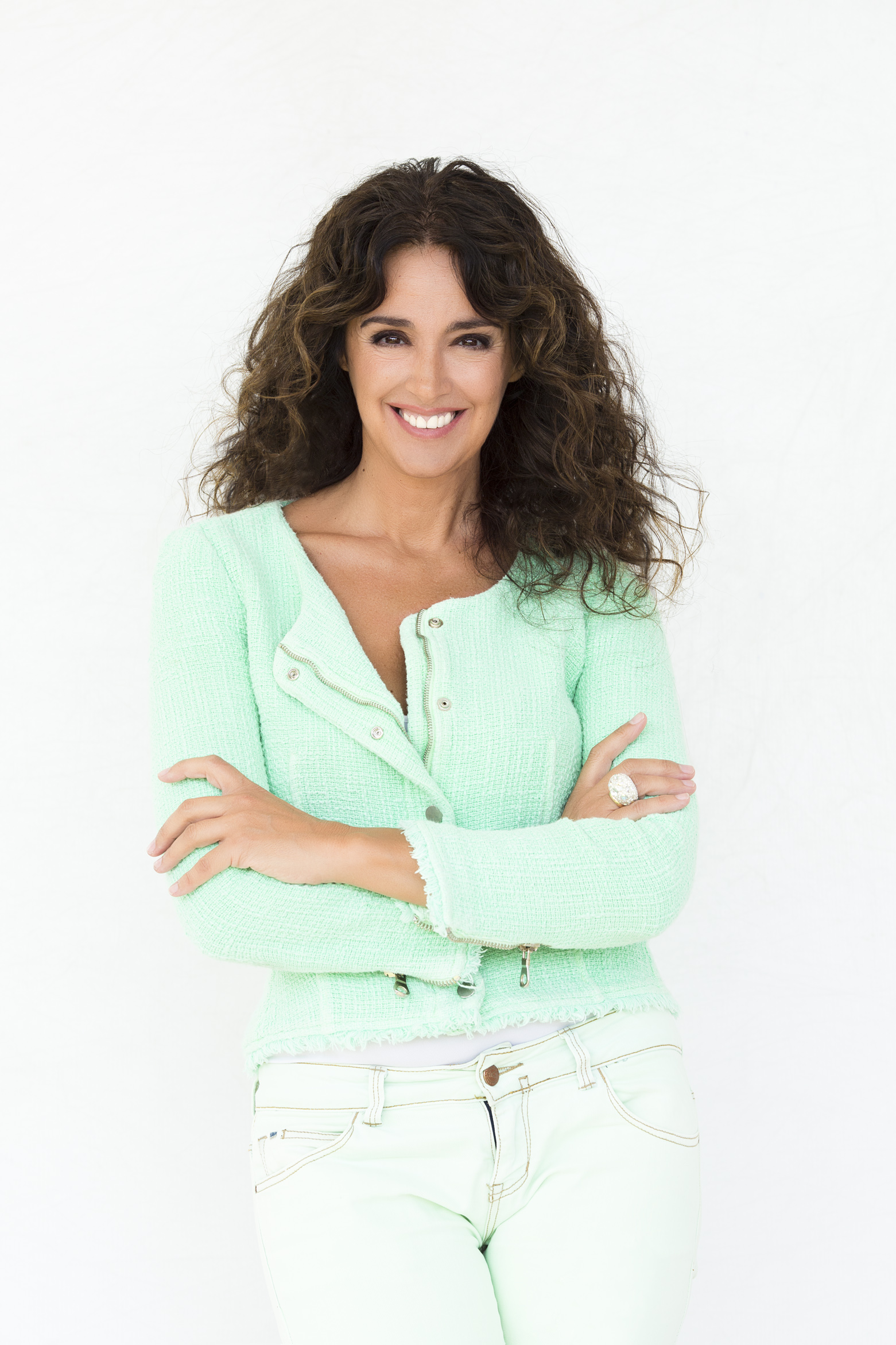 Garbiñe Abasolo